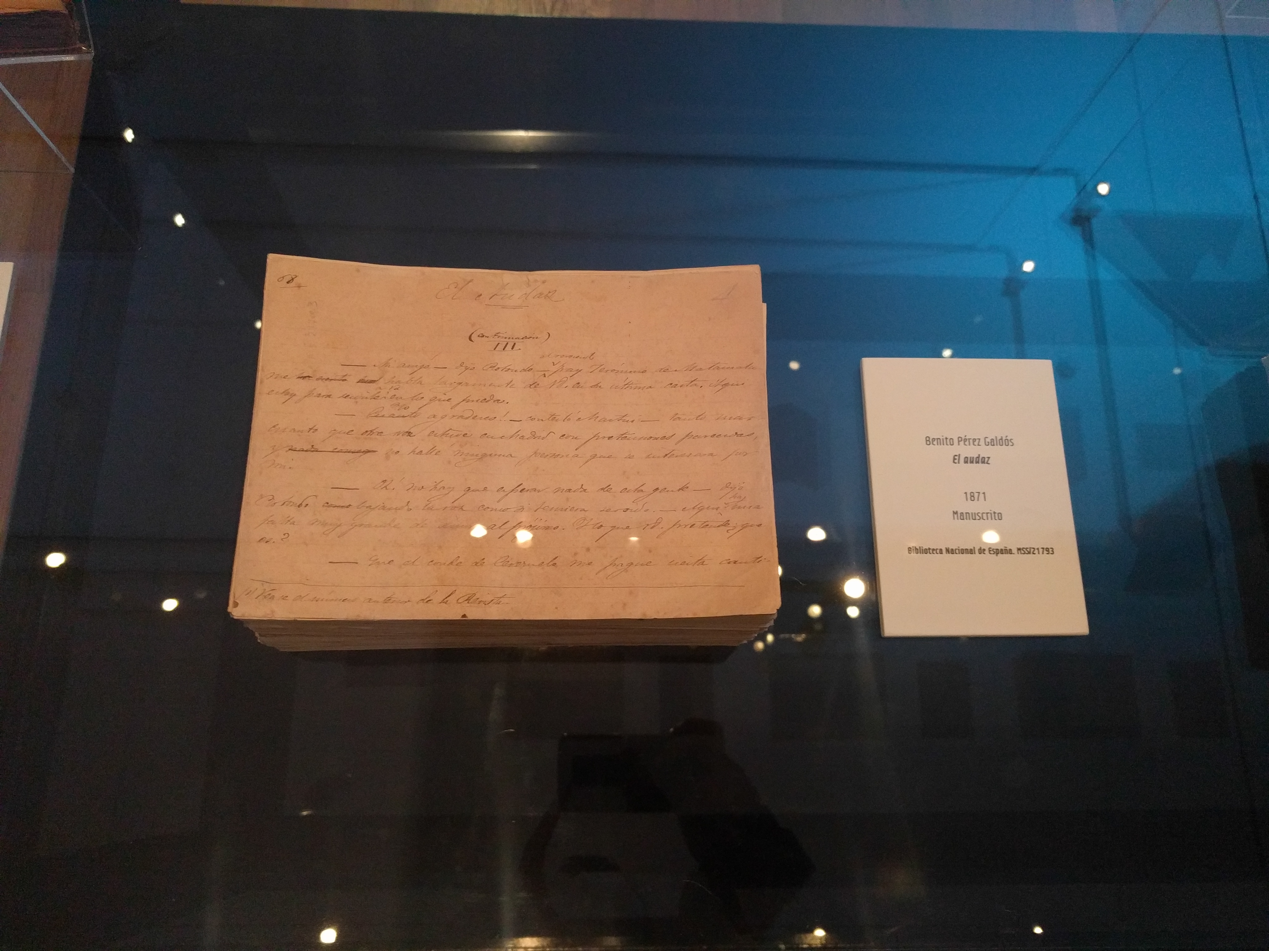 Manuscrito de El audaz de Benito Pérez Galdós, 1871. Biblioteca Nacional de España.